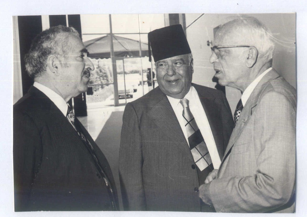 Avec le President Suleiman Franjieh et le Premier Ministre Rachid Karameh